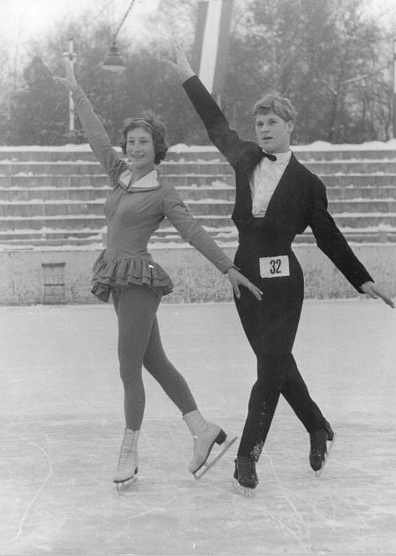 Margit Senf, Peter Göbel Zentralbild Wagner 18.1.1960 Deutsche Eiskunstlauf-Meisterschaft 1960. Am 16. und 17.1.1960 wurde in Karl-Marx-Stadt die Deutsche Meisterschaft im Eiskunstlauf durchgeführt. Meister wurde bei den Damen Heidi Steiner (SC Dynamo Berlin), bei den Herren Bodo Bockenauer (SC Dynamo Berlin) und im Paarlauf Margit Senf und Peter Göbel (beide SC Einheit Berlin). UBz: Margit Senf und Peter Göbel. Die Deutschen Meister im Paarlaufen.